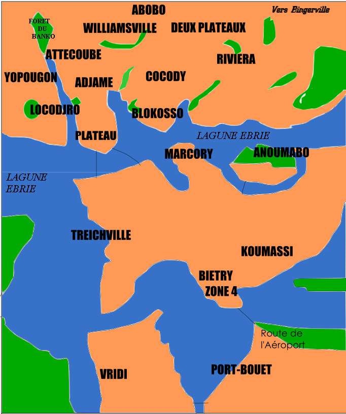 auteur : Fr@ncky Dicaprio ©